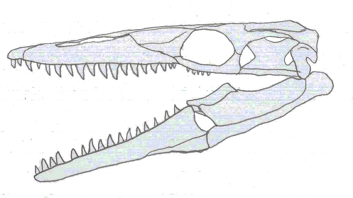 skull restoration of Russellosaurus